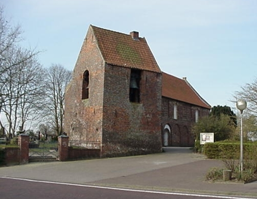 Ansicht der Wiesenser Kirche von Norden her